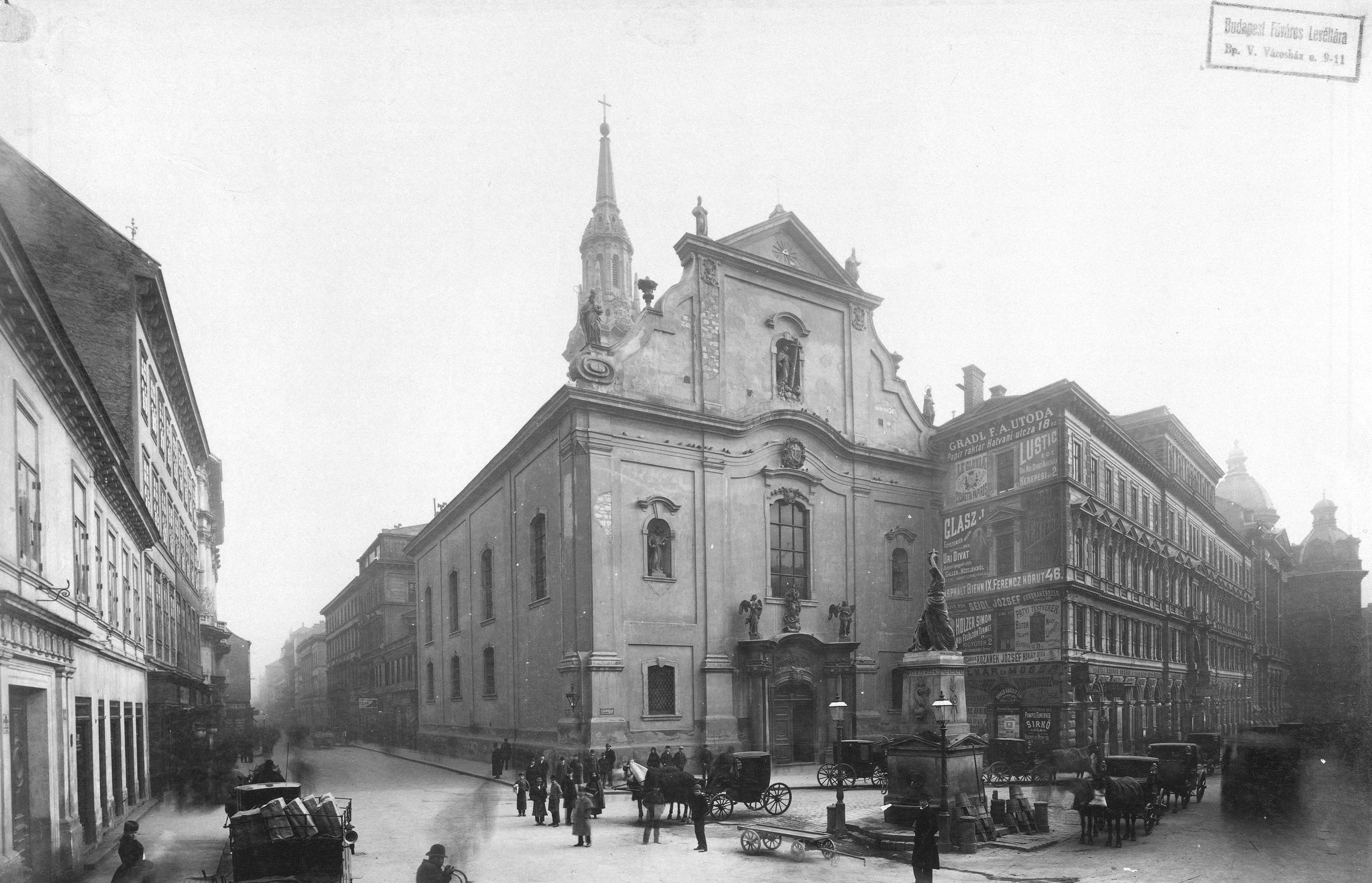 Klösz György felvétele. Ferenciek tere és az egykori Kossuth Lajos utca. A felvétel 1890 után készült." A kép forrását kérjük így adja meg: Fortepan / Budapest Főváros Levéltára. Levéltári jelzet: HU.BFL.XV.19.d.1.07.124